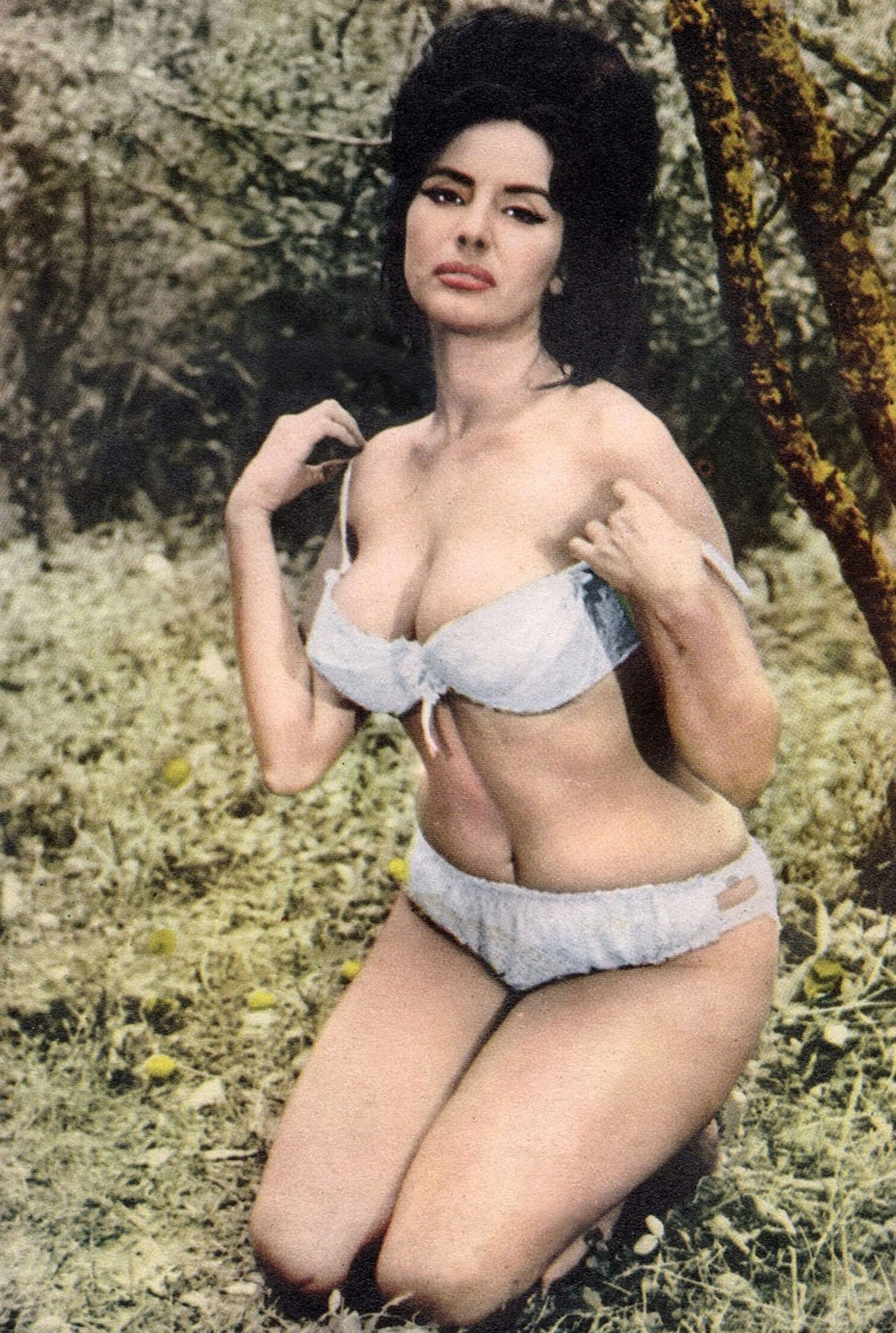 La actriz argentina Isabel Sarli en los años sesenta.